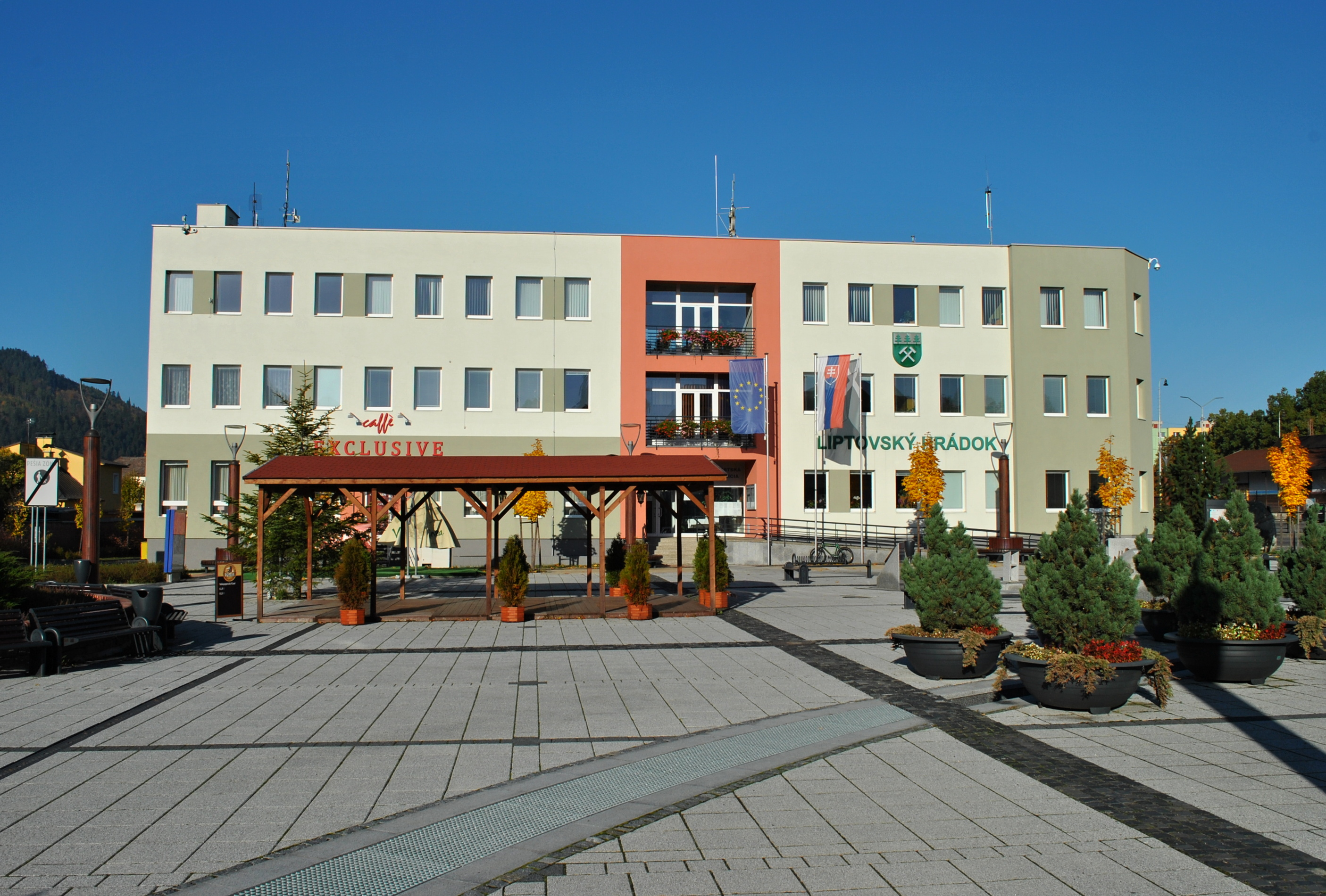 Liptovský Hrádok - mestský úrad a námestie Františka Wisnera